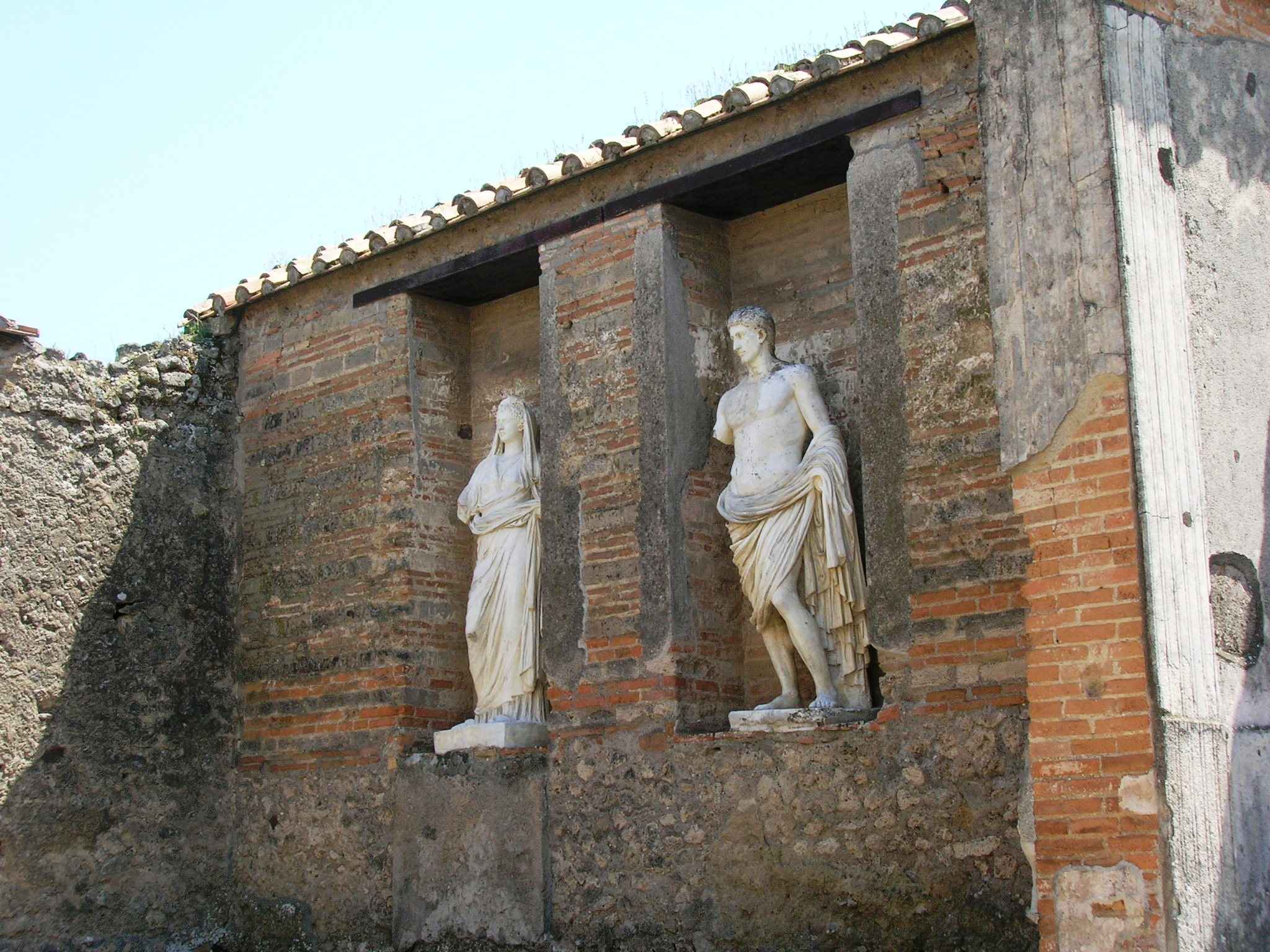 Il Macellum